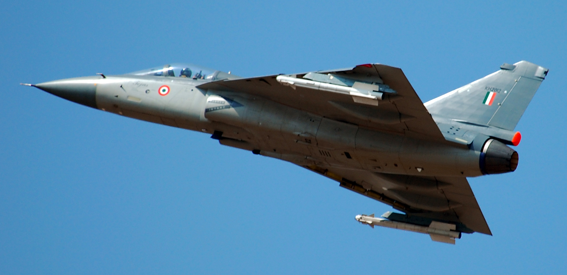 HAL Tejas at Aero India 2009